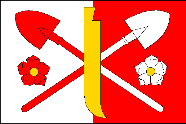 vlajka, Dlouhomilov, okres Šumperk